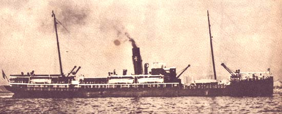 Fotografia do navio da Série Ita, Itagiba, de propriedade da Companhia Nacional de Navegação Costeira, afundado na costa da Bahia, em 17 de agosto de 1942, o que causou a morte de 36 pessoas.